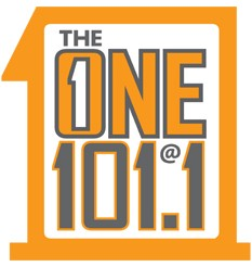 CIXF-FM logo